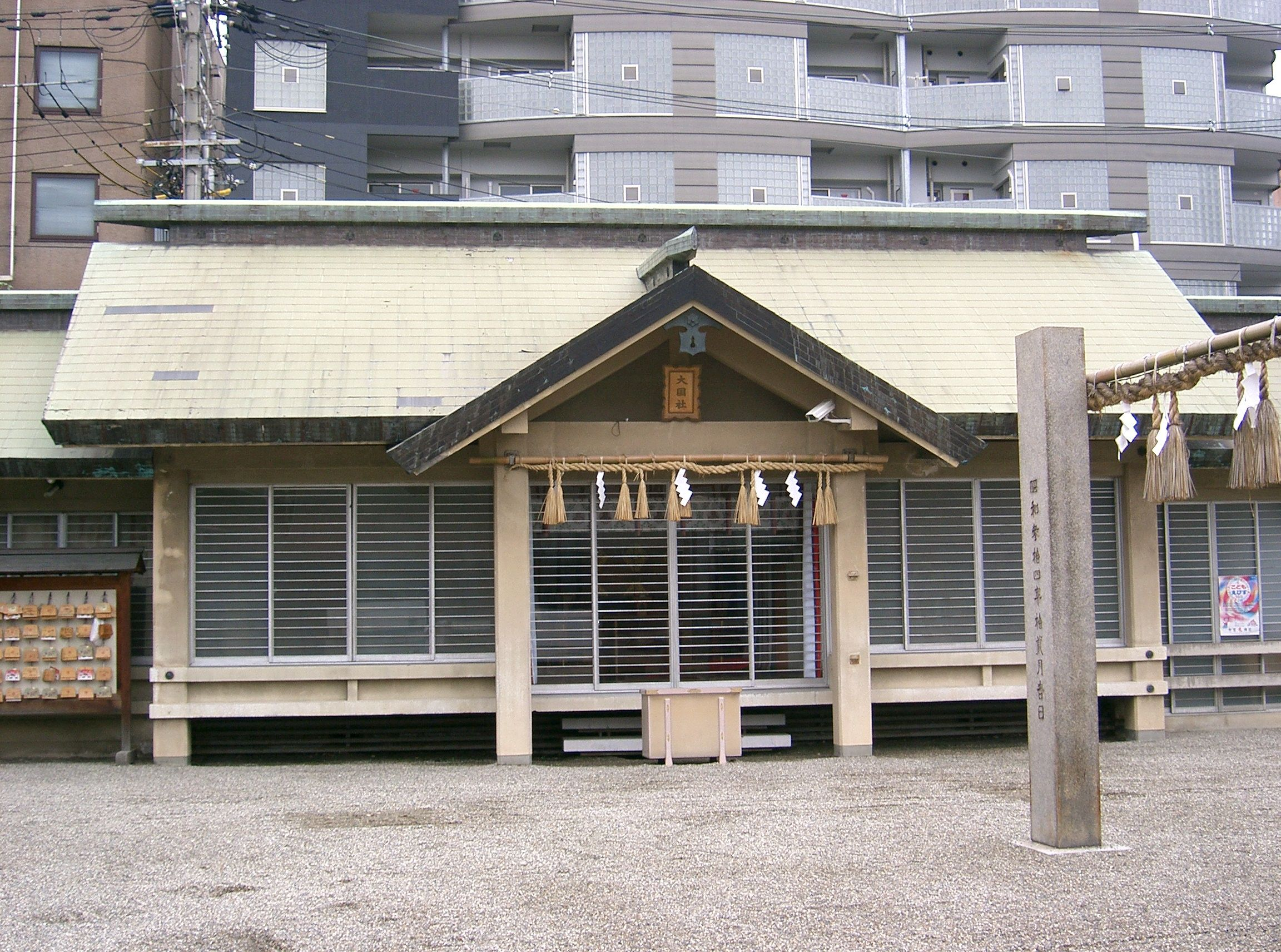 今宮戎神社 大国社